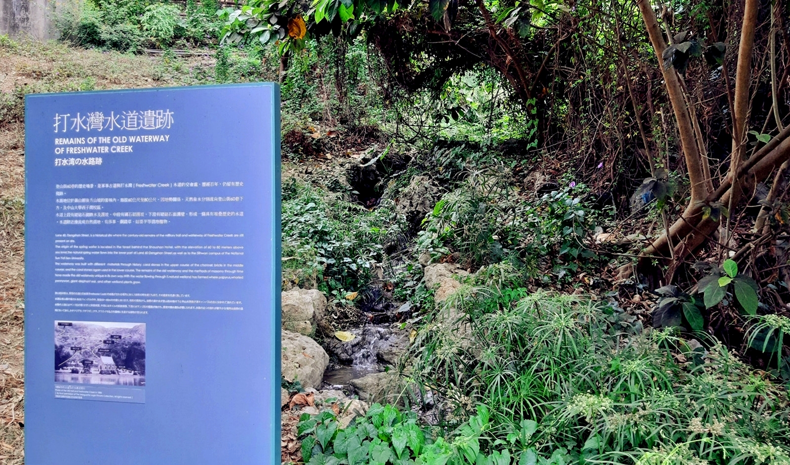 中文（台灣）: 隱身於壽山國家自然公園內的打水灣水道遺跡，水源地位於壽山館後方山坡海拔60公尺至80公尺的密林內。天然泉水分別流向登山街60巷下方，及中山大學西子灣校區，形成一條具有堆疊歷史的水道。水道附近漫流成自然濕地,有莎草、銅錢草、姑婆芋等濕地植物。